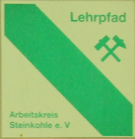 Bergbaulehrpfad Schedewitz–Oberhohndorf, Wegesymbol. Zwickau, Sachsen, Deutschland.